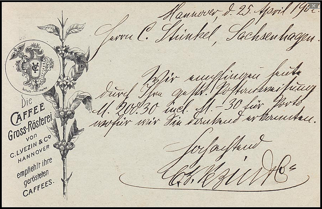 Vordruck mit der Abbildung einer Schutzmarke und dem Text „Die Caffee Gross-Rösterei von C. L. Vezin & Co., Hannover empfiehlt ihre gerösteten Caffees.“ Auf der Karte an "Herrn C. Stünkel, Sachsenhagen" vom 25. April 1902 weist der Unterzeichner handschriftlich auf den Empfang von Geldern durch den Kunden hin ...